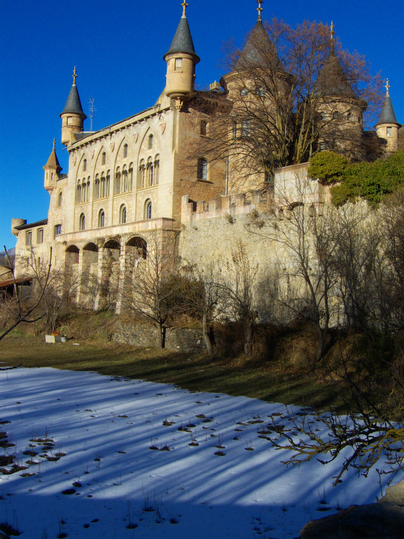 Torre del Riu (Alp), castell romàntic See also: Castles in Spain and Castle.